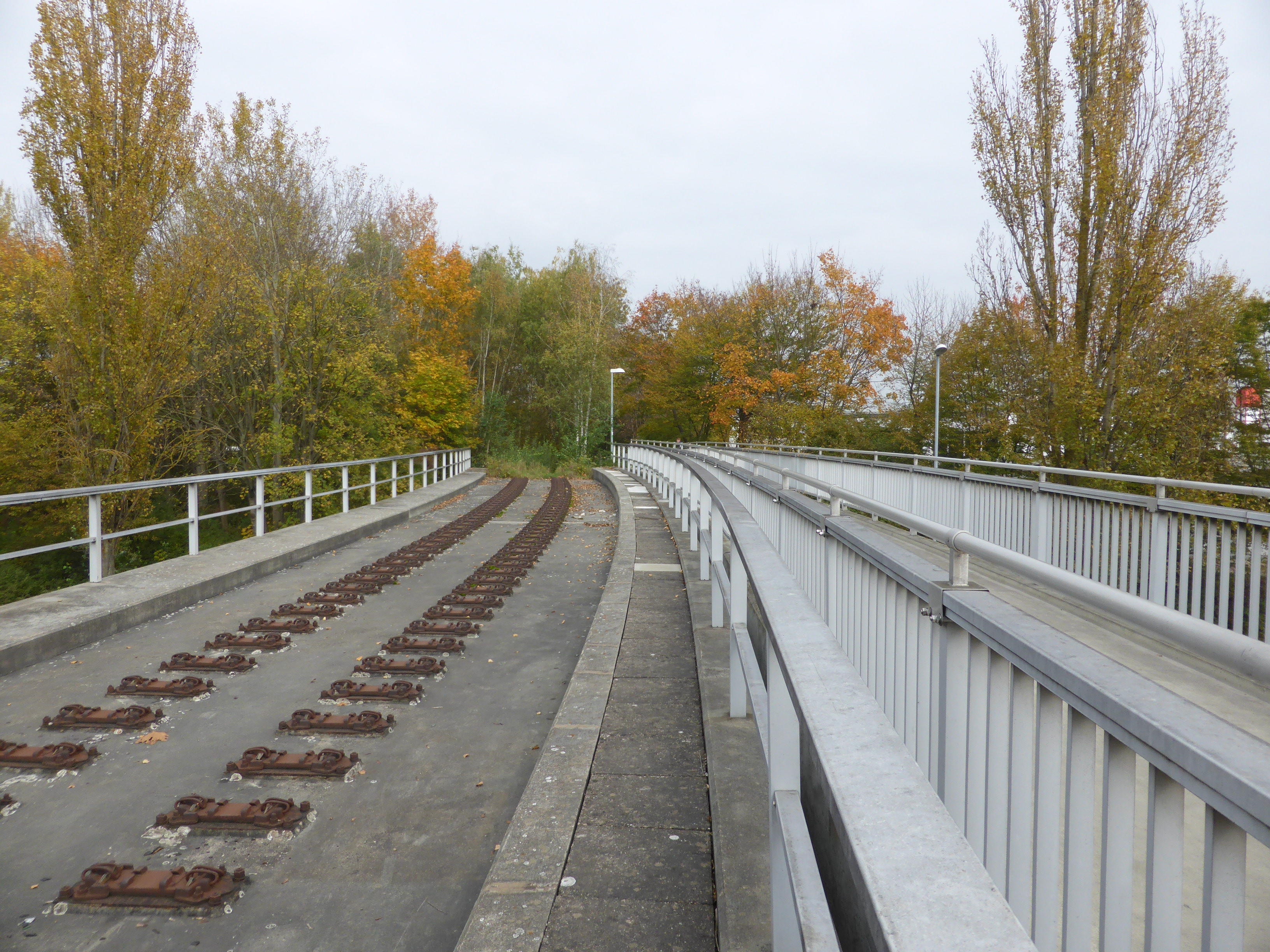 Fußgänger- und ehemalige Eisenbahnbrücke über die Römerstraße in Ingolstadt.